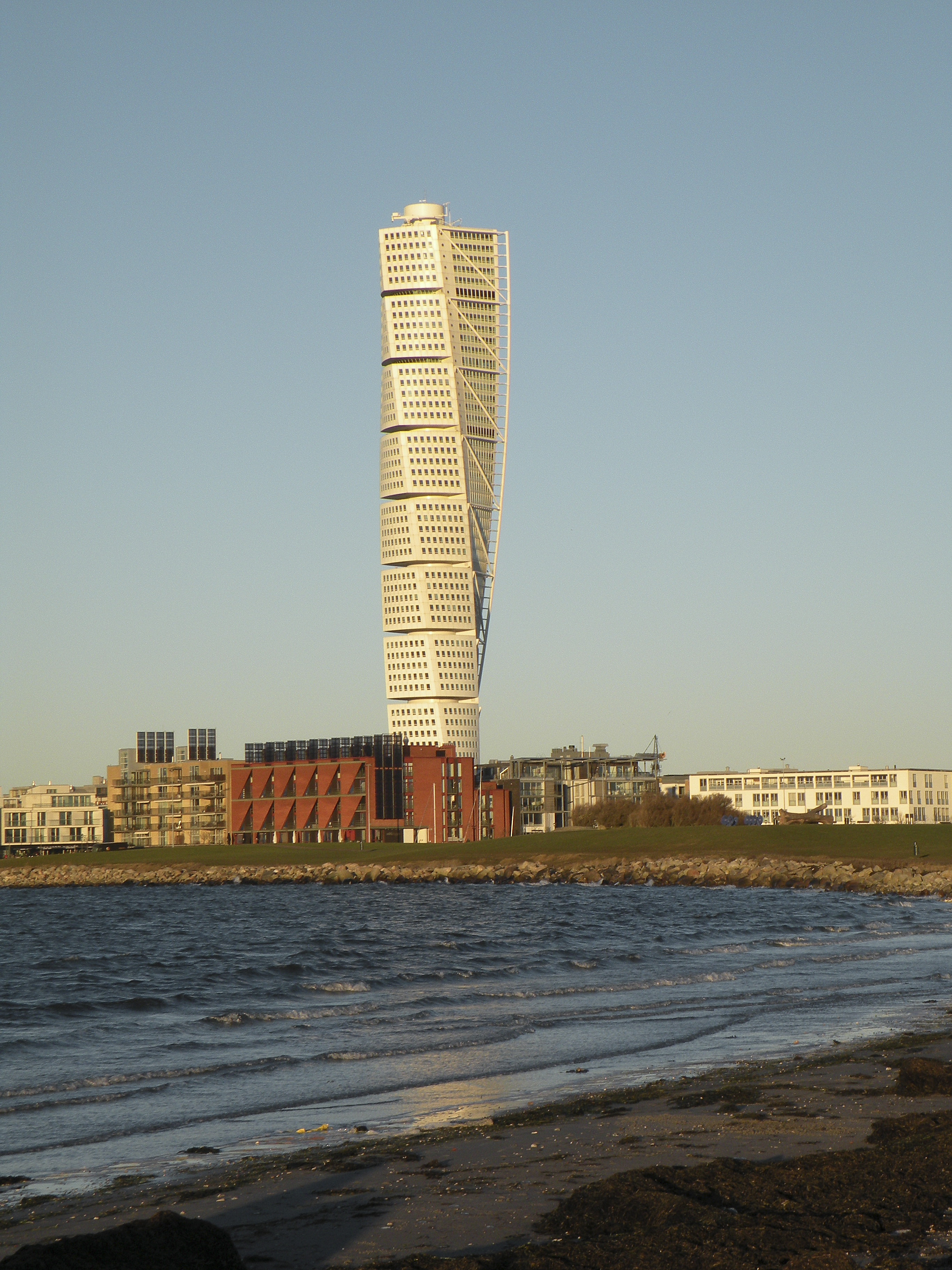 Небоскрёб Turning Torso ("Скрученое туловище") в Мальмё. Вид с моря.